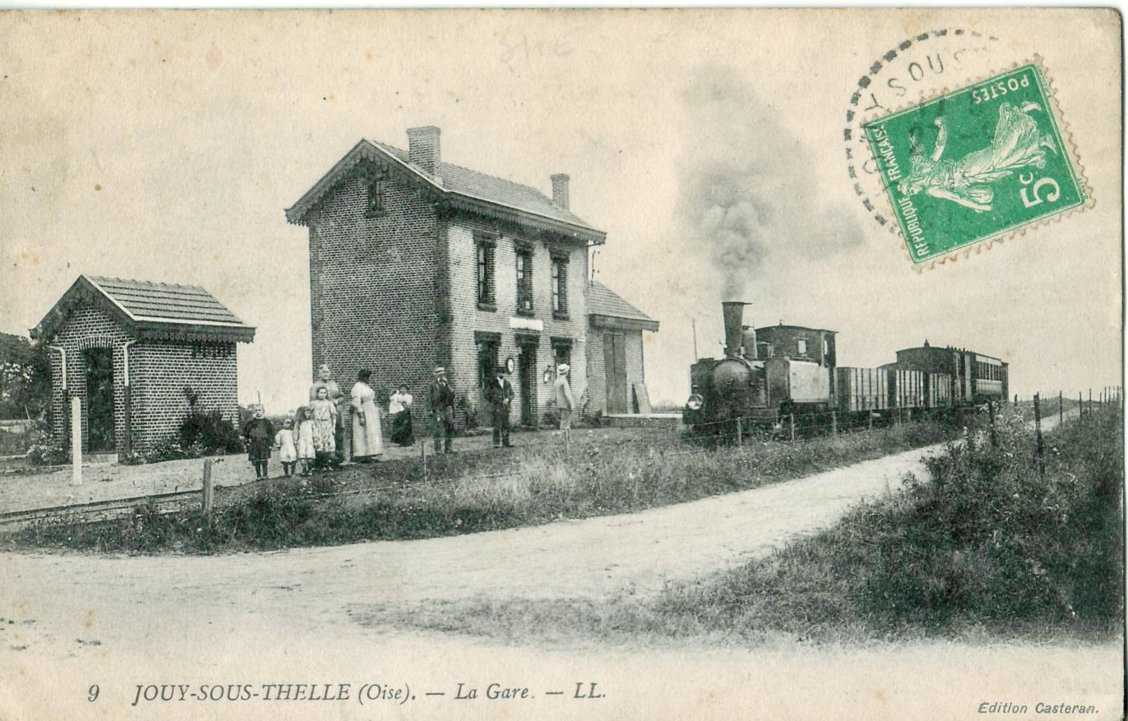 Carte postale ancienne éditée par LL, n°9 (et mention : édition Casteran) :JOUY-SOUS-THELLE - La gare